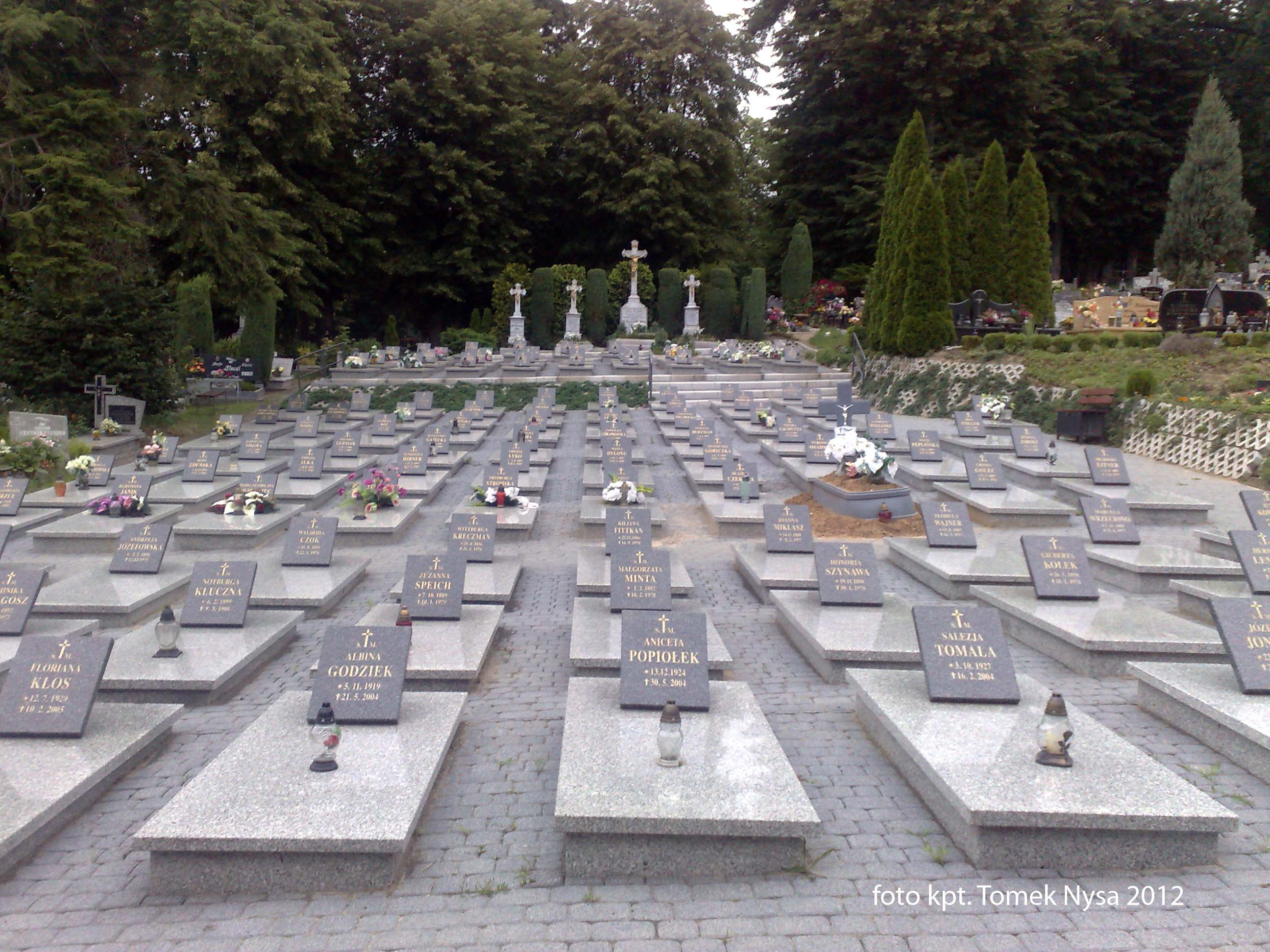 foto kpt. Tomek Nysa 2012